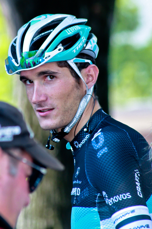 Prologue (Martigny) du Tour de Romandie 2011